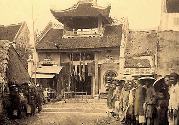 Một ngôi đền của Hoa kiều. Ảnh chụp thời Pháp thuộc